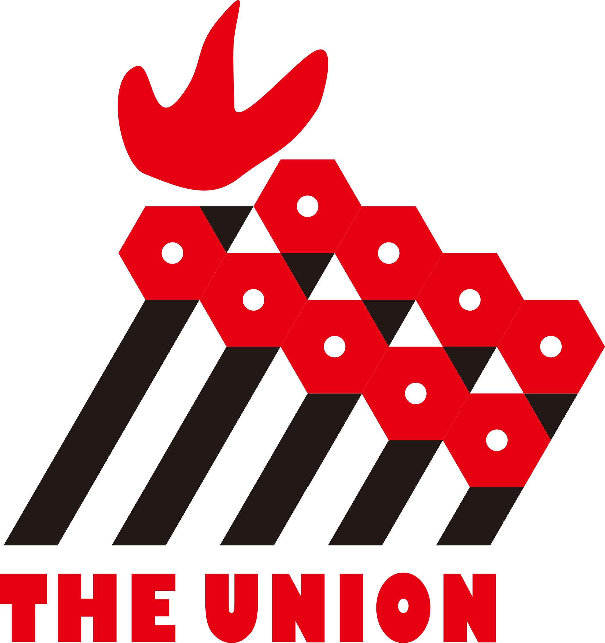 台灣高等教育產業工會logo